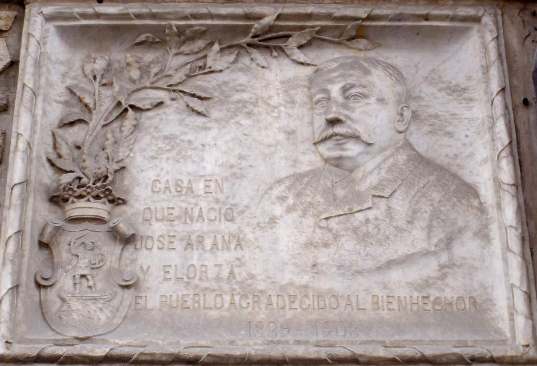 Aquí nació el bienhechor José Arana y Elorza (1839-1908). Escoriaza, Guipúzcoa.